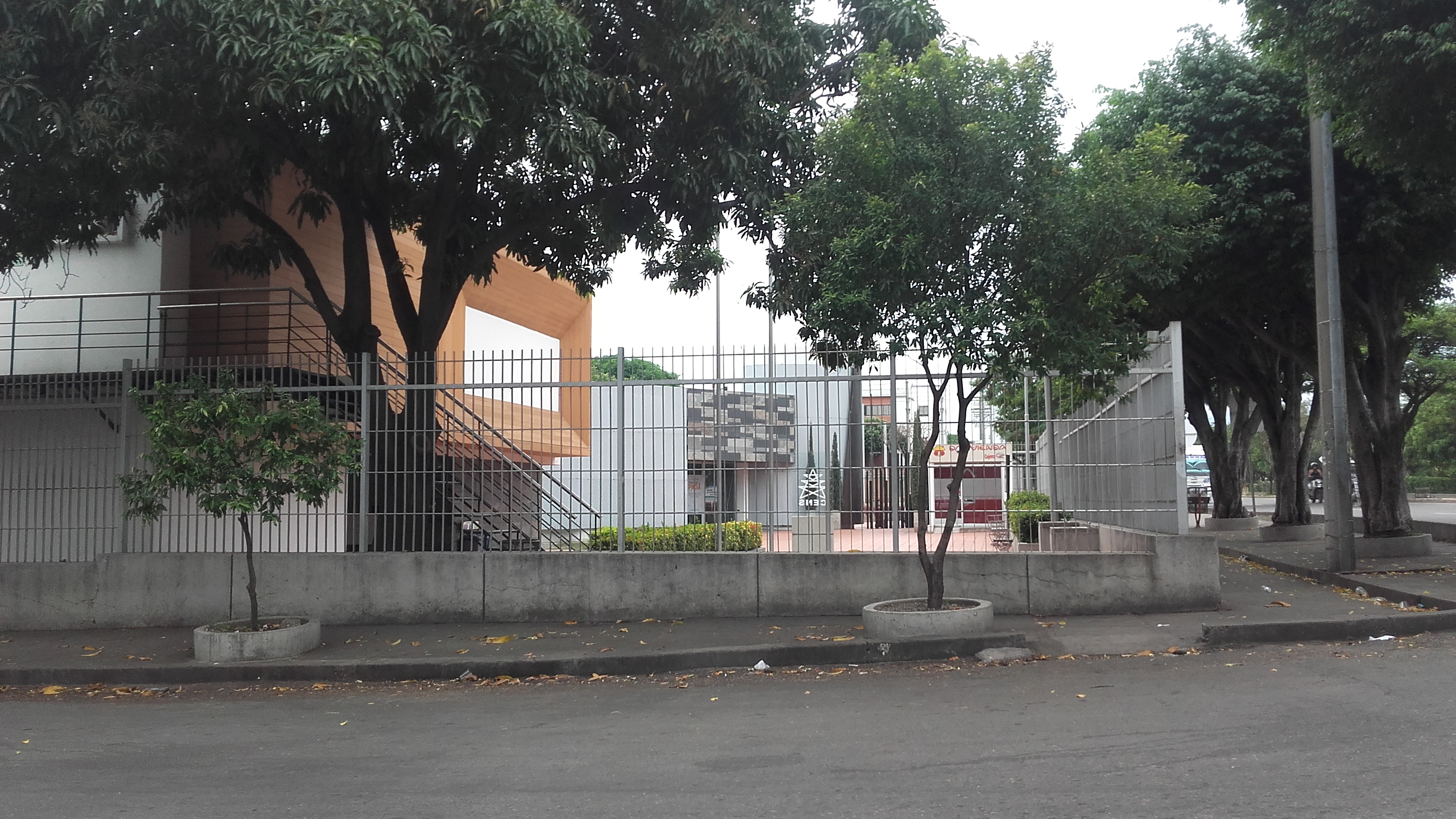 dmfmmfmfmfmfmfn